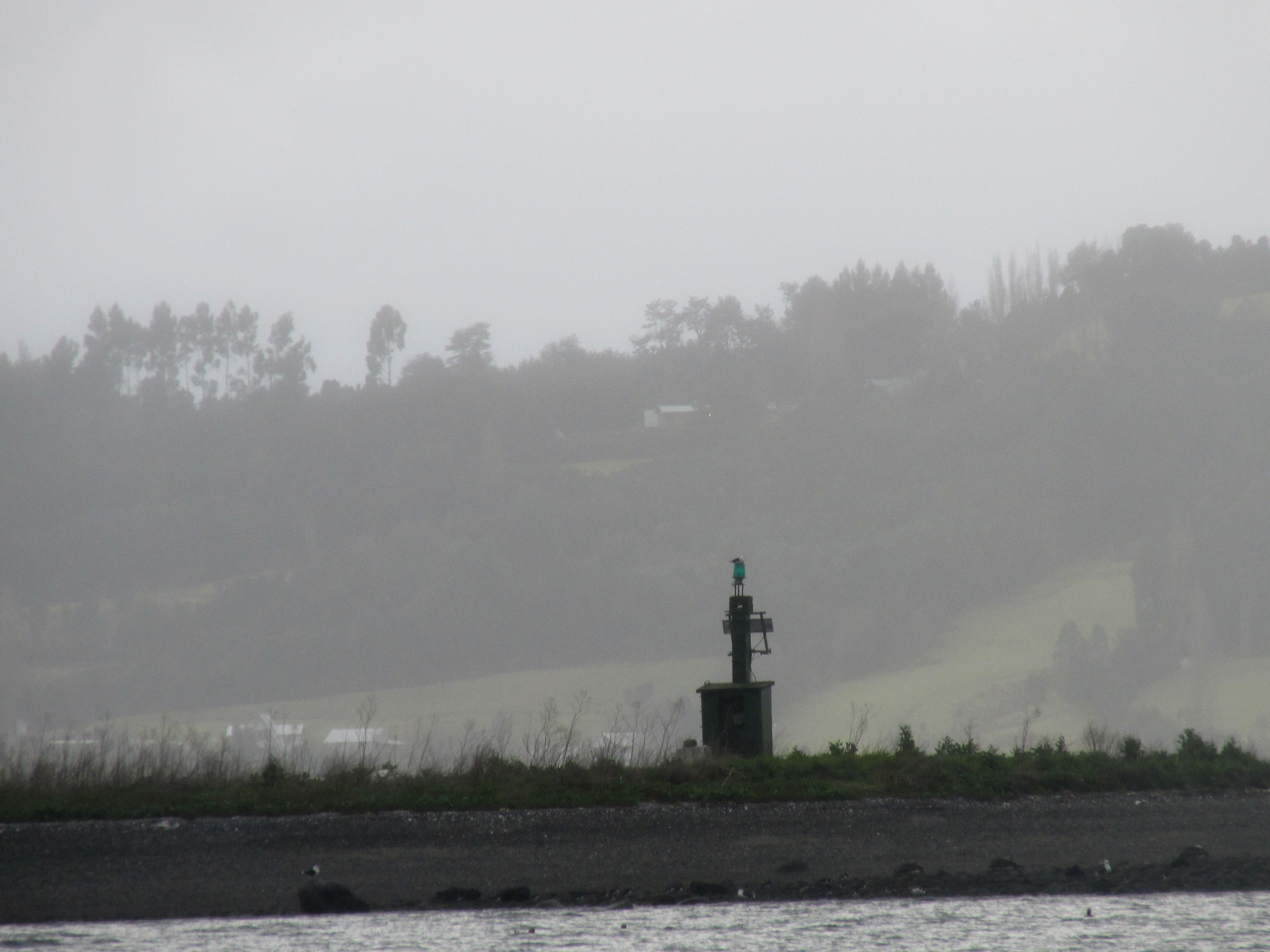 Faro en uno de los islotes del canal Yal, entre la isla de Chiloé y la de Lemuy, región de los Lagos, Chile